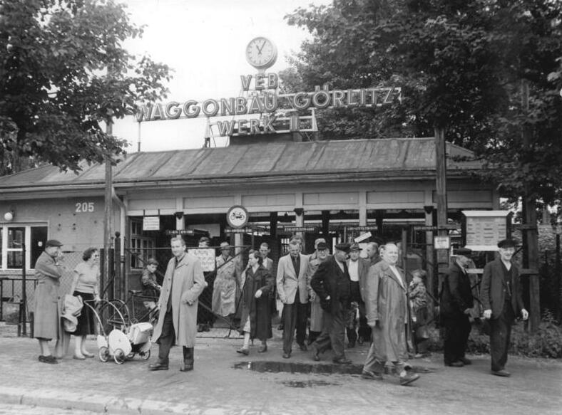 Görlitz, VEB Waggonbau Görlitz, Werk II, Eingang Zentralbild Kahl 21.7.1959 VEB Waggonbau Görlitz UBz: Eingang zum Werk II des VEB Waggonbau Görlitz.